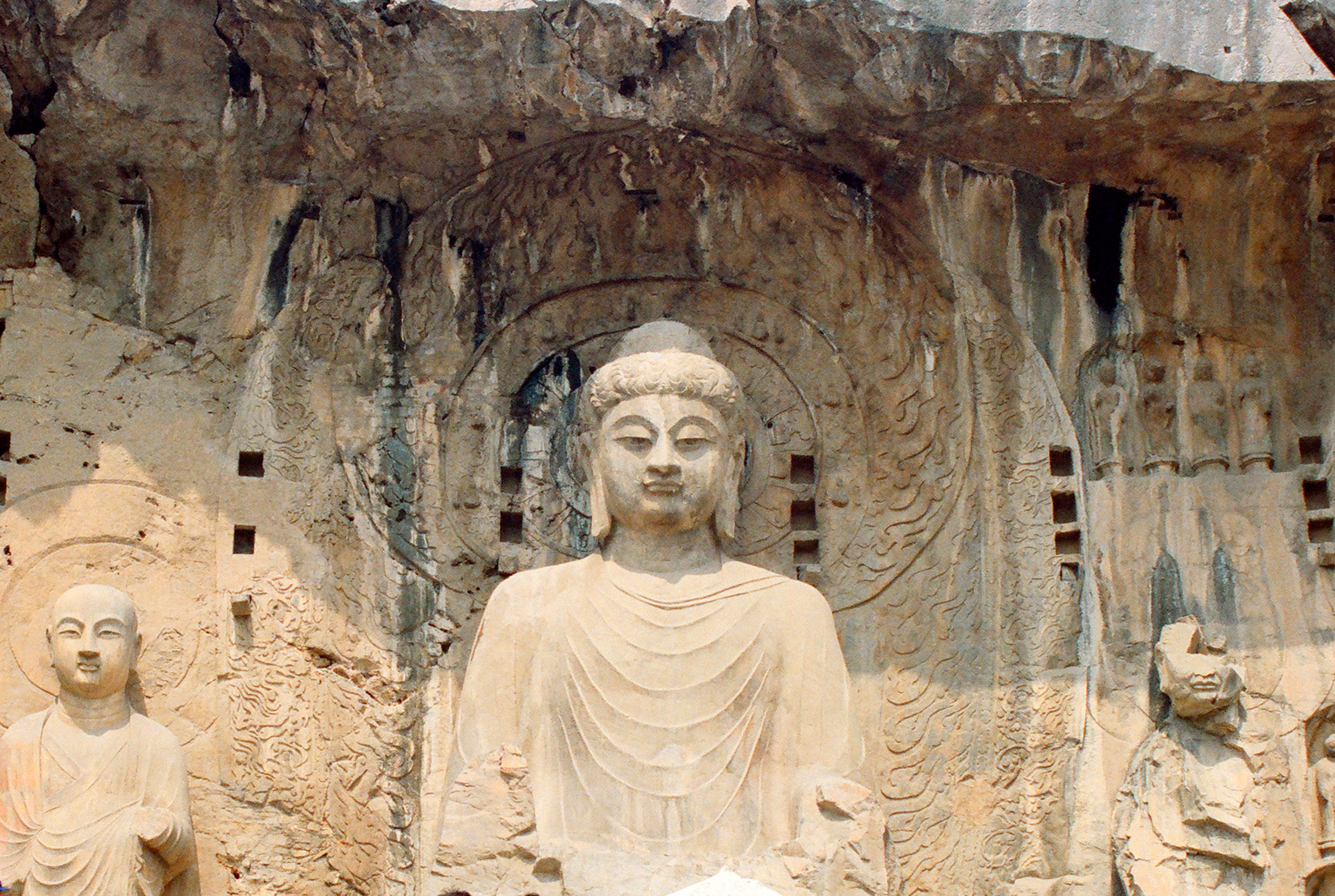 Bouddha central des grottes de Longmen à Luoyang en Chine